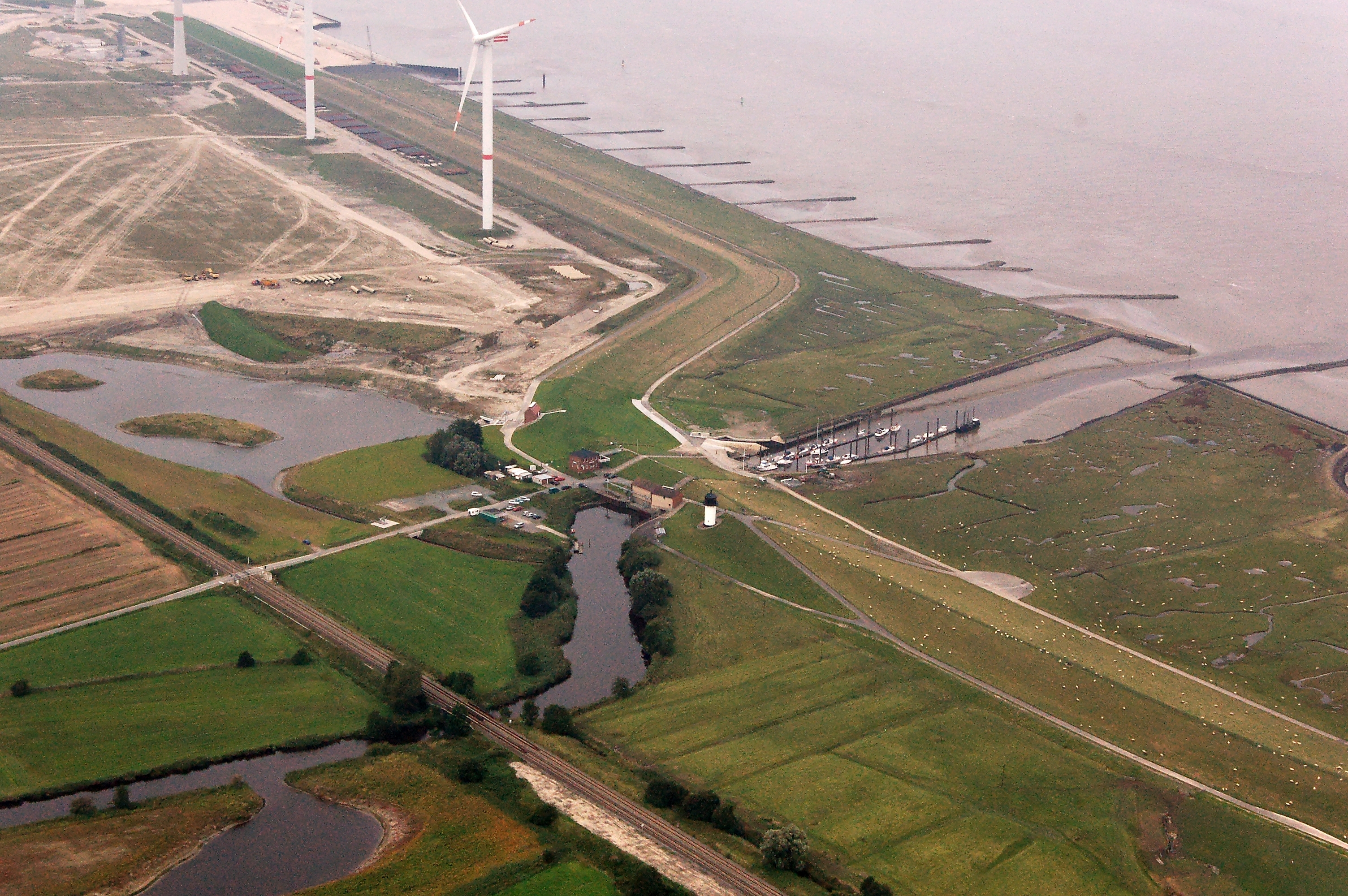 Impressionen Fotoflüge September 2011 (CPB) Dieses Foto entstand aufgrund eines Projektes, das von Wikimedia Deutschland e. V. gefördert wurde. Im Rahmen des „Community-Projektbudgets“ sollen Luftbilder u.a. von Inseln, Halligen, Sanden und Küstenstädten der deutschen Nordseeküste angefertigt werden. Das Projekt „Fotoflüge“ wurde im September 2011 begonnen.